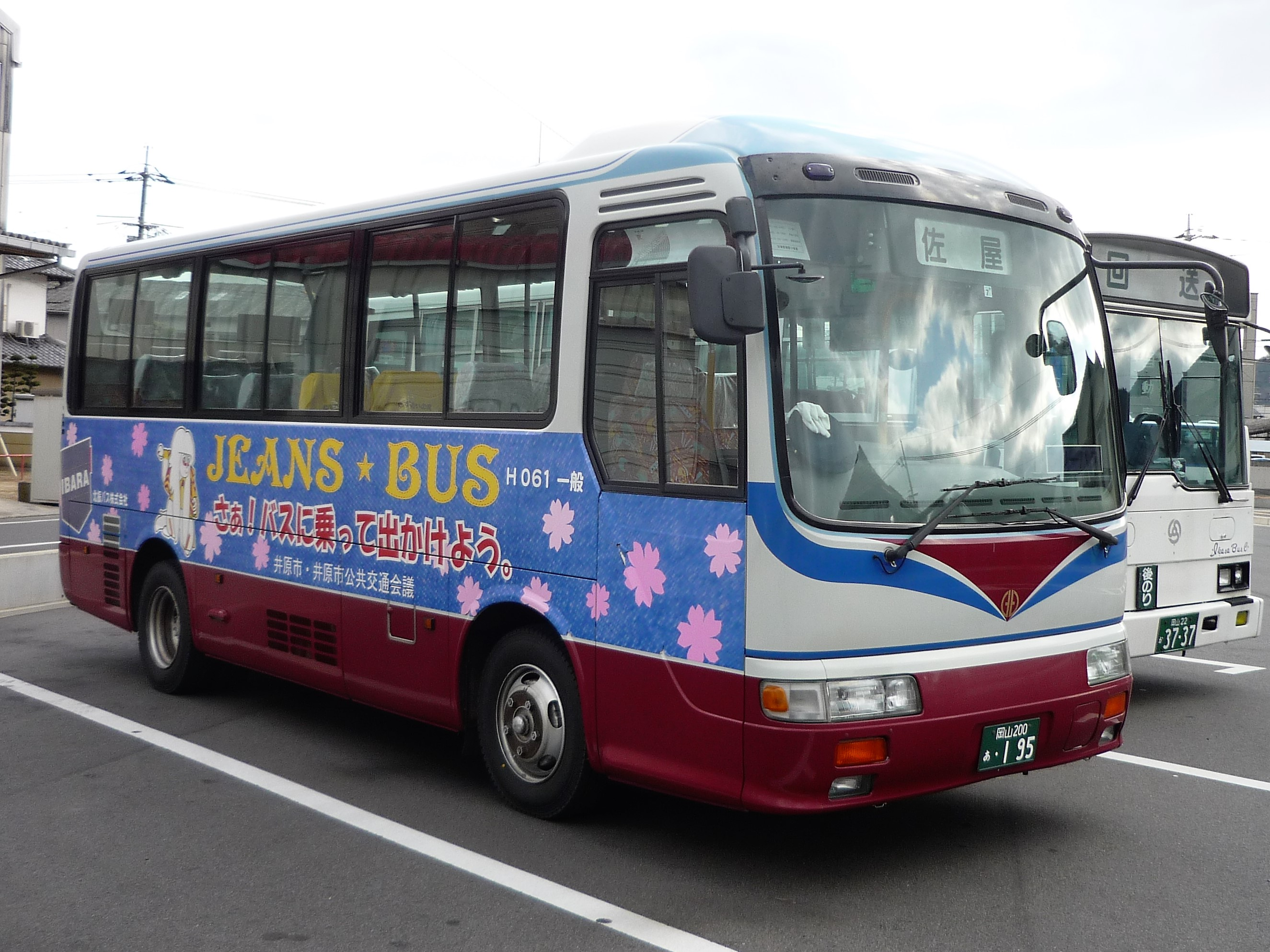 井原バスセンターに停車中の北振バス